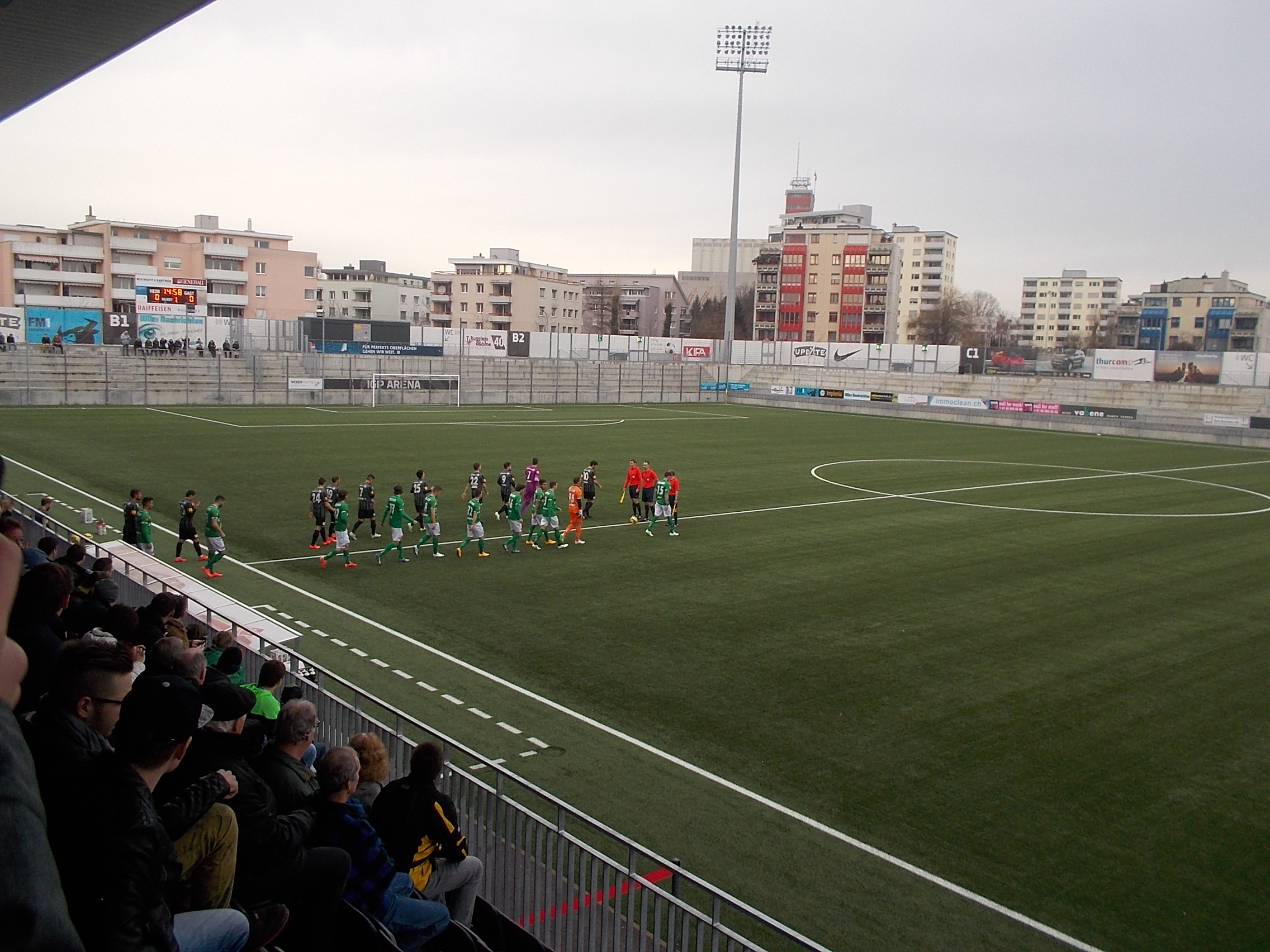 Die einlaufenden Mannschaften des FC Wil und des FC St. Gallen beim Testspiel am 16. Januar 2015 im Stadion Bergholz